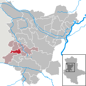 Völpke in Saxony-Anhalt (Country) - District (Landkreis) Börde